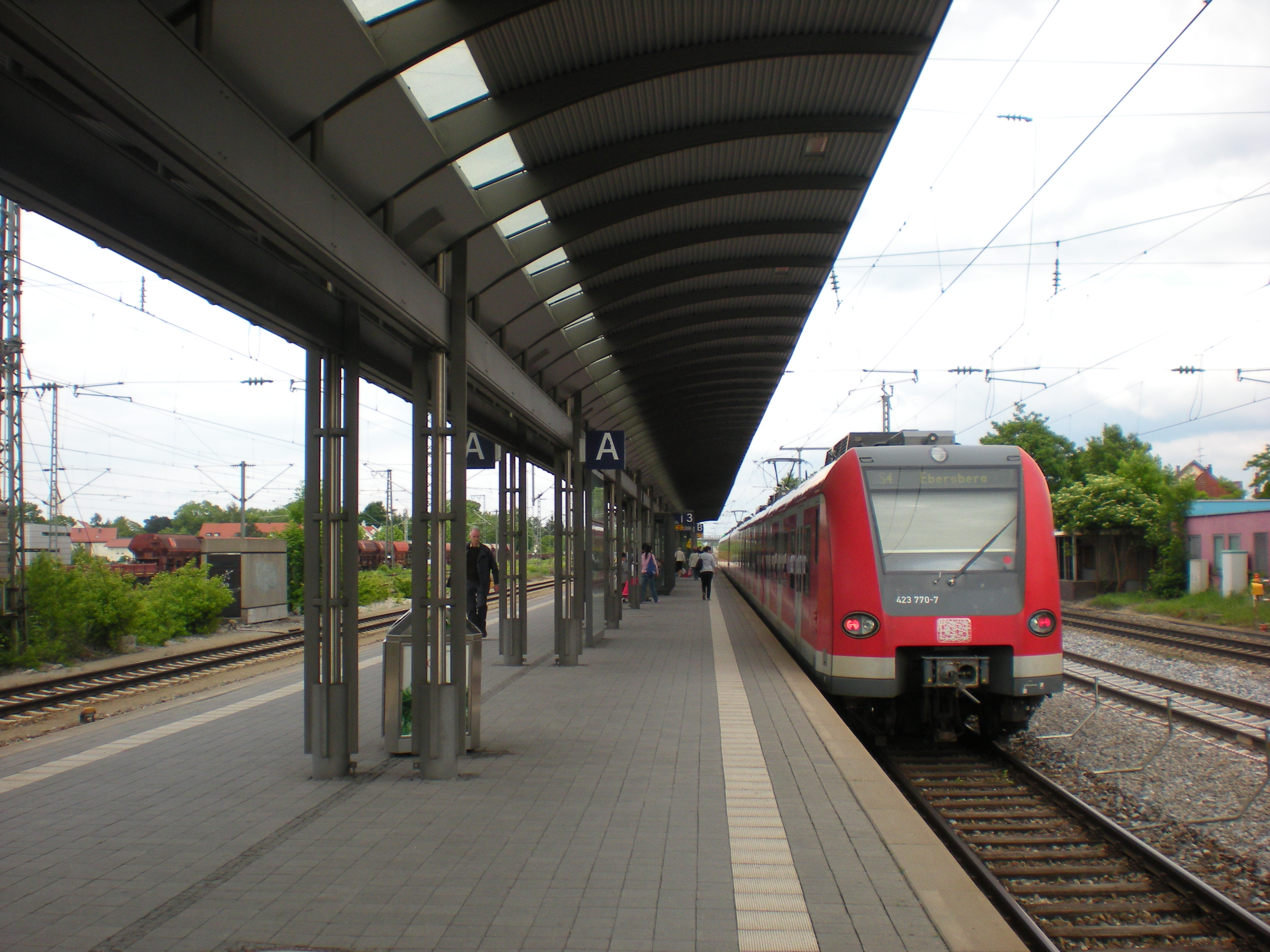 Bahnsteig des S-Bahnhofs München-Trudering mit S4 nach Ebersberg